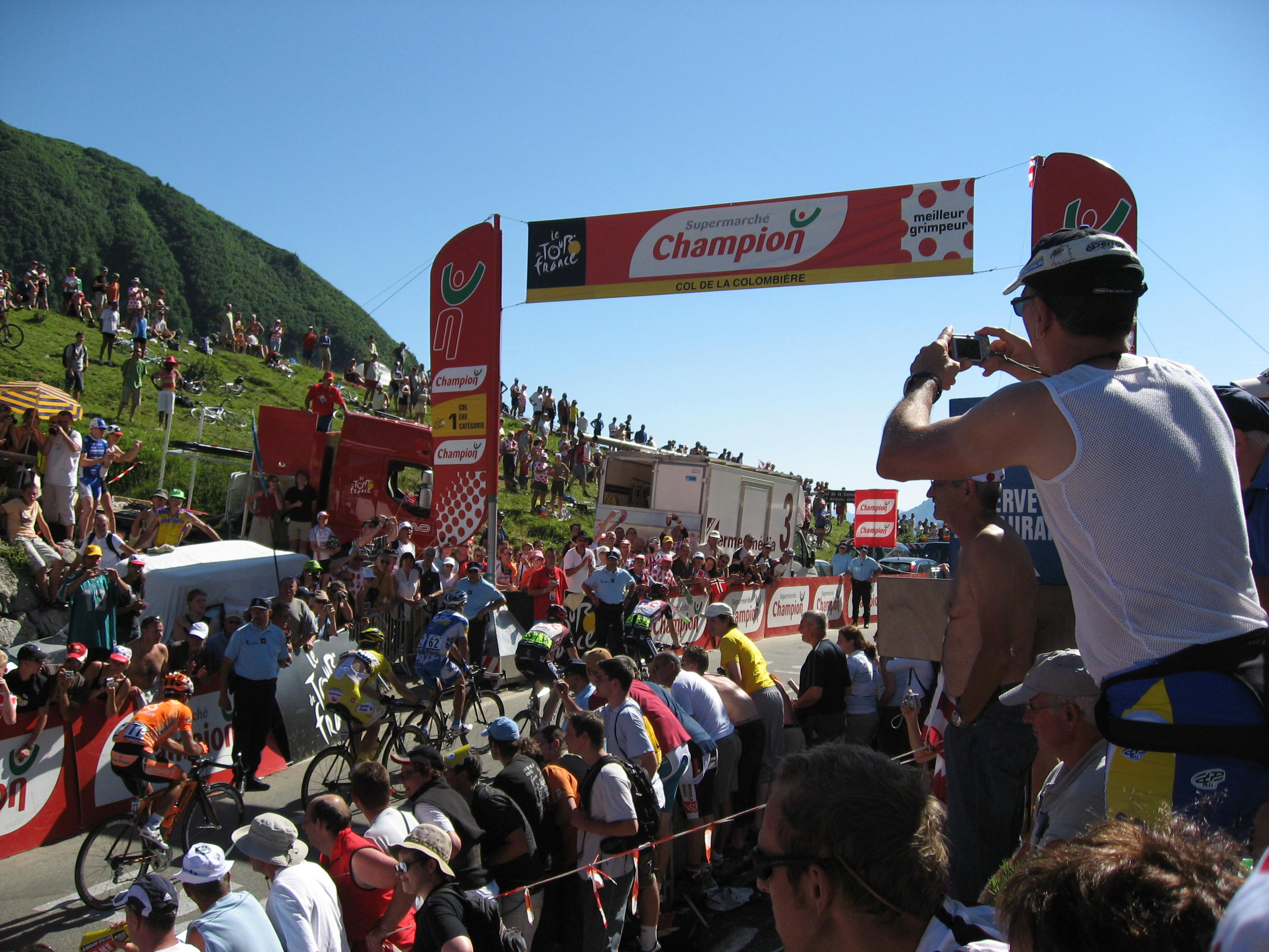 The Tour de France peloton (2007 Tour de France) on the Col de la Colombiere